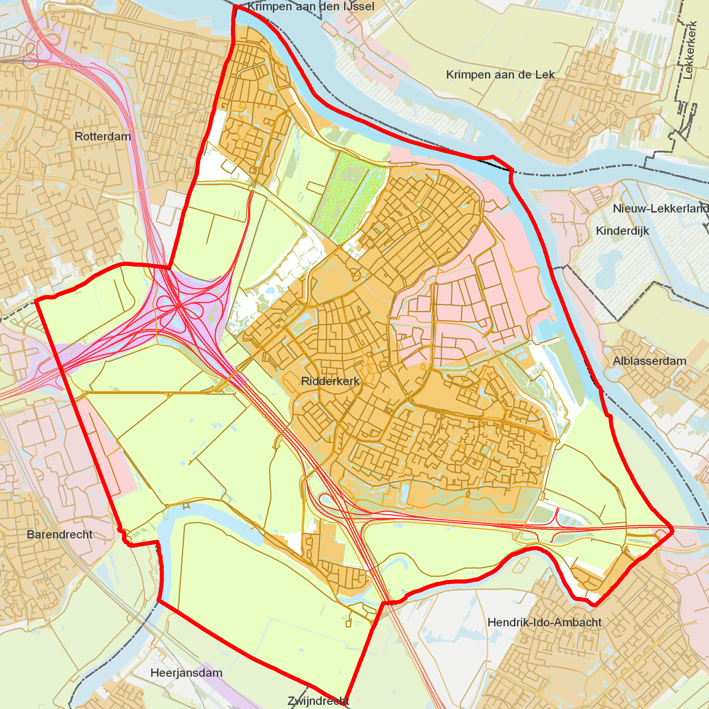 BAG woonplaatsen - Gemeente Ridderkerk.png